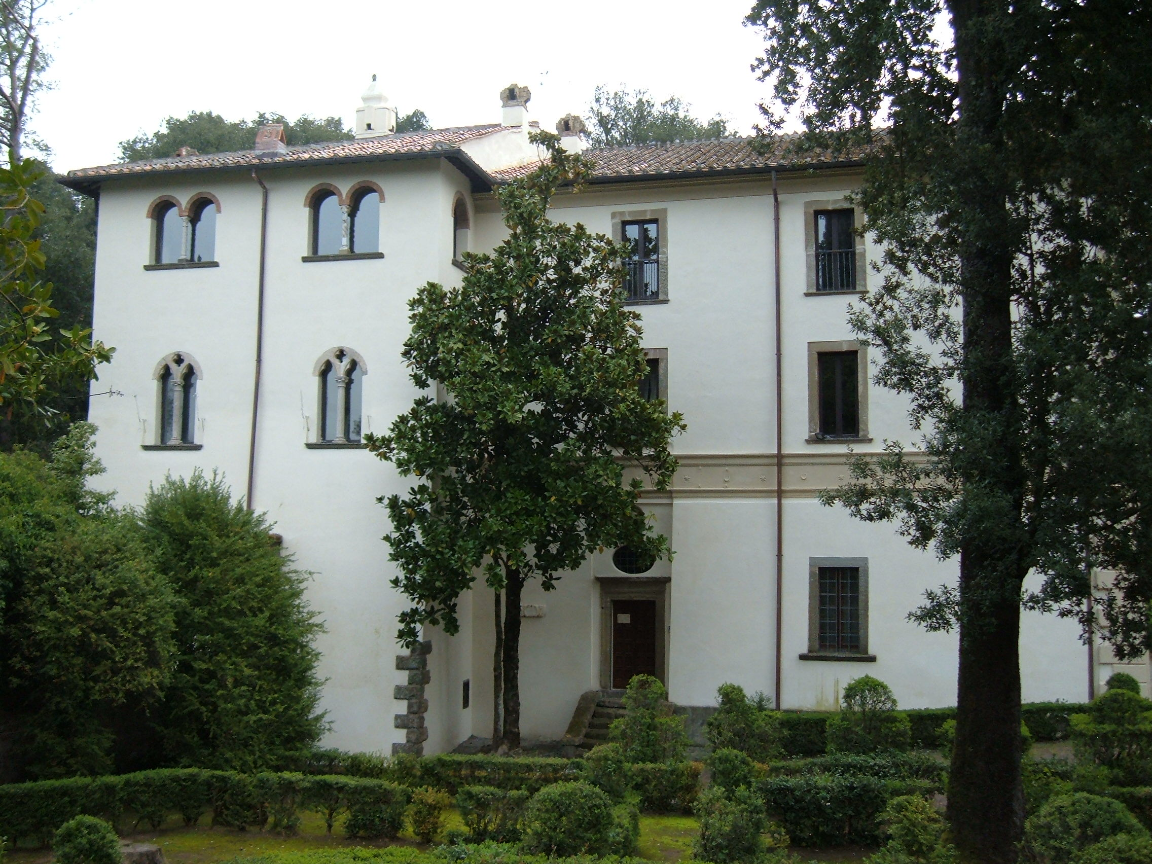 Villa Savorelli (Sutri)